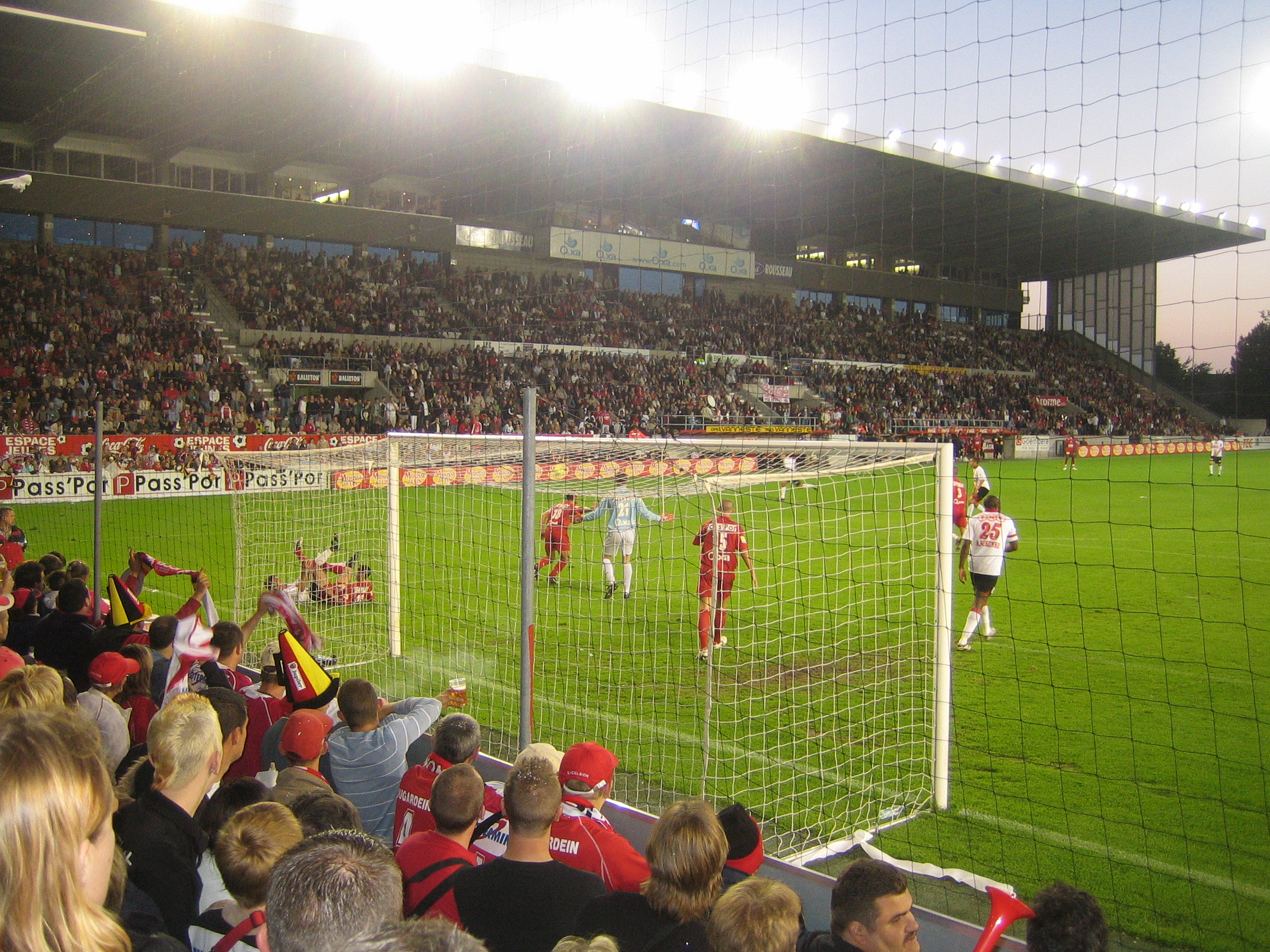 Nouvelle tribune Royal Excelsior Mouscron : Mouscron - Standard de Liège